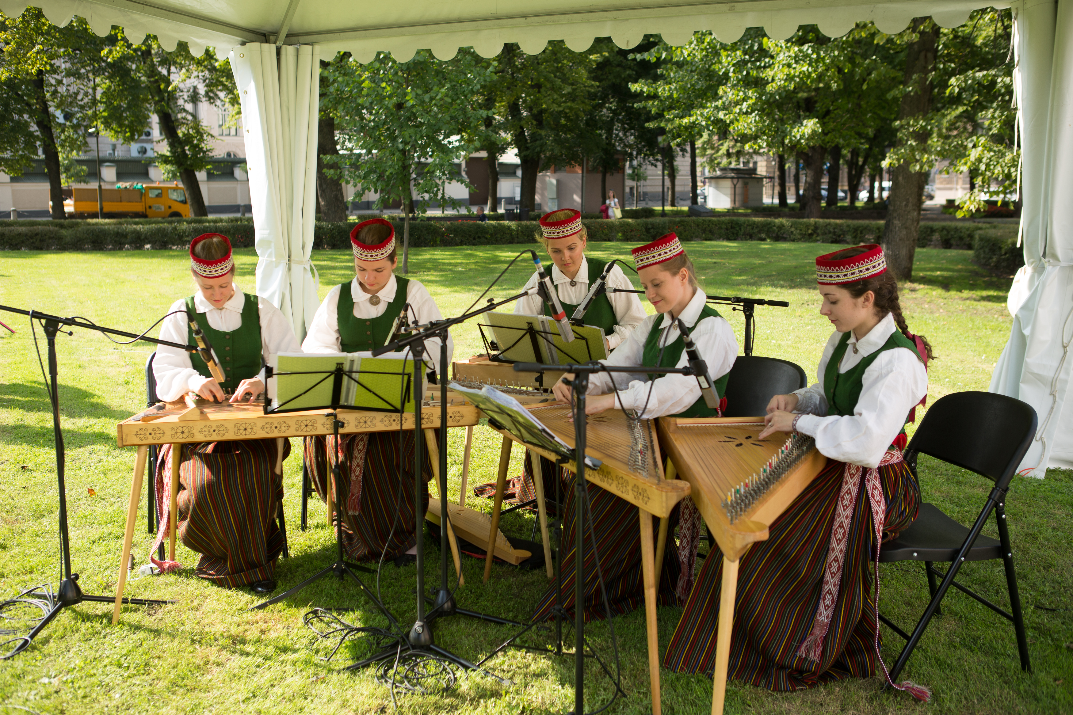 2016.gada 21.augusts. Par godu Latvijas valsts neatkarības faktiskās atjaunošanas 25.gadadienai Jēkaba laukumā pie Saeimas nama Baltijas un Ziemeļvalstu parlamentu priekšsēdētāji, kā arī Augstākās padomes deputāti, kuri pirms 25 gadiem balsoja par valsts neatkarības atjaunošanu, iestāda ošus un ceriņus. Foto: Ernests Dinka, Saeimas Administrācija Izmantošanas noteikumi: saeima.lv/lv/autortiesibas